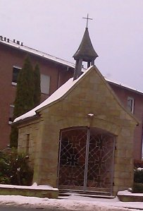 Kleine Kapelle im Zentrum von Dröper